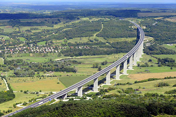 Kőröshegyi völgyhíd 2016